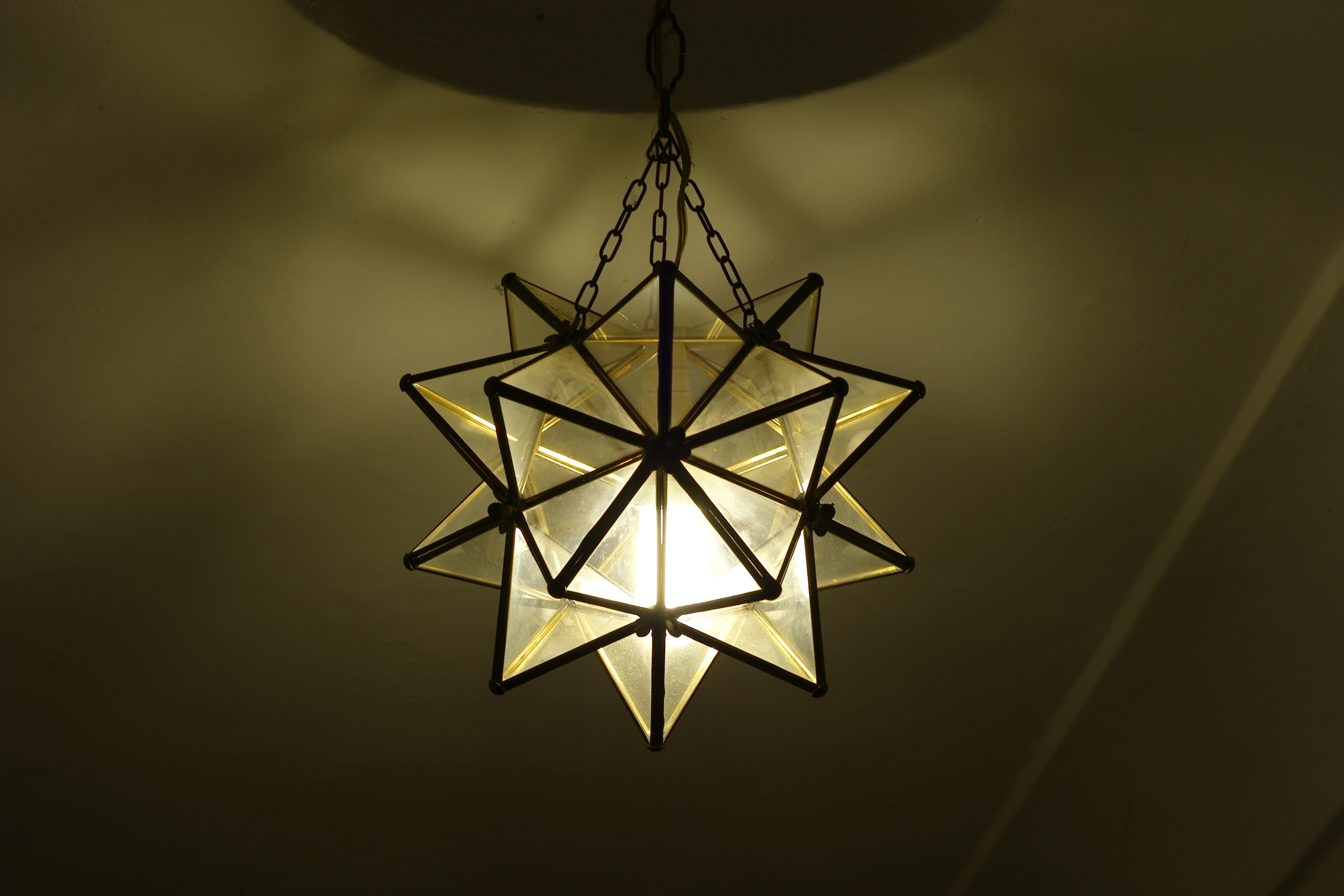 La Stella Ducale di Urbino, tradizionale lampada della città marchigiana.